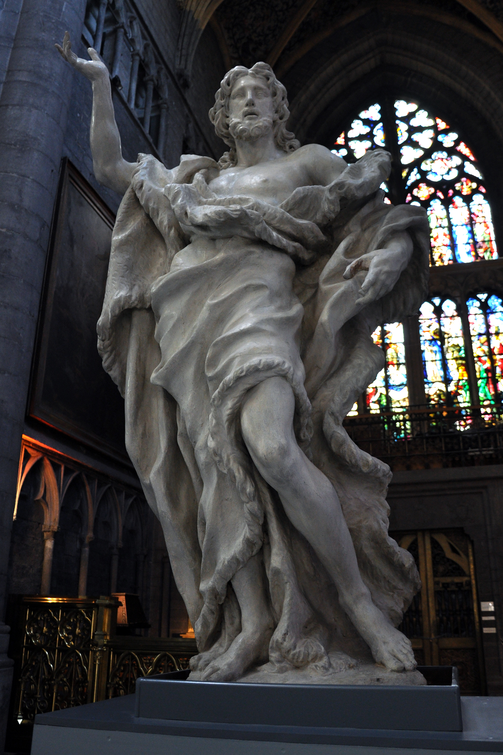 Cathédrale Saint-Paul de Liège: statue en tilleul de Saint-Jean Baptiste, datée de 1682, provenant de l'église Saint-Jean Baptiste en Féronstrée ( disparue ), et attribuée à Jean Del Cour (1631-1707).